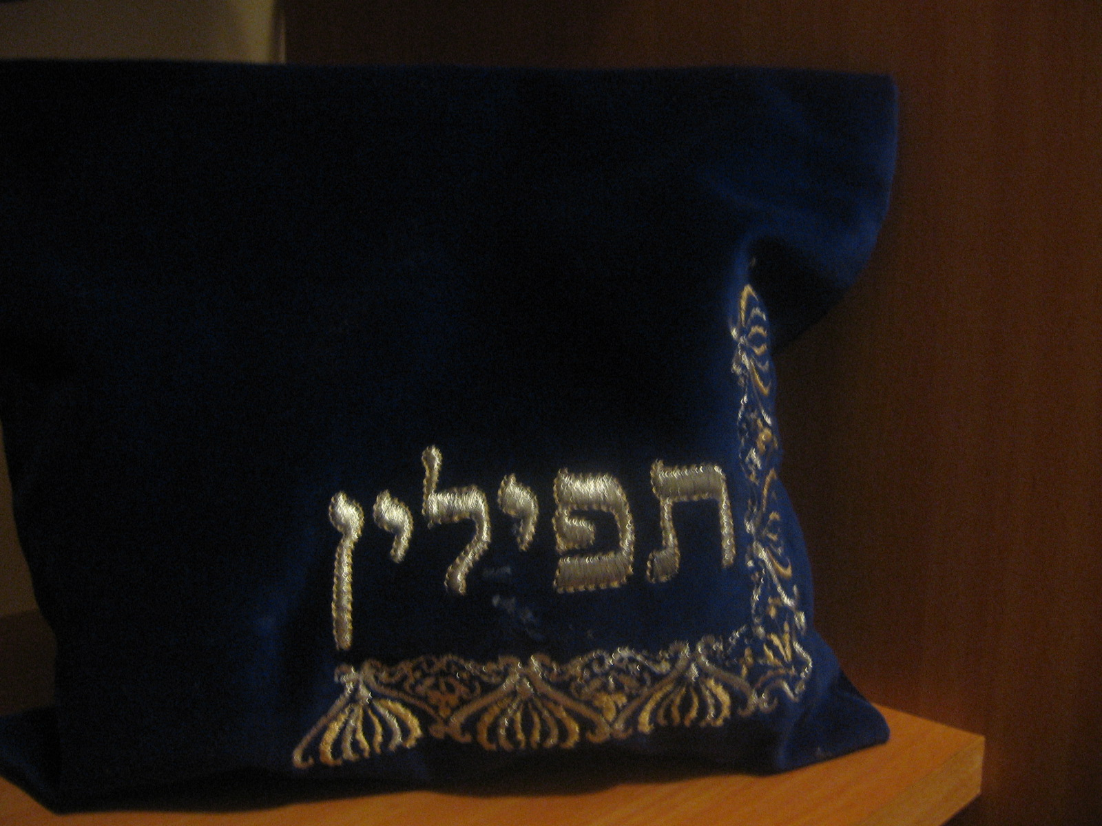 תיק תפילין